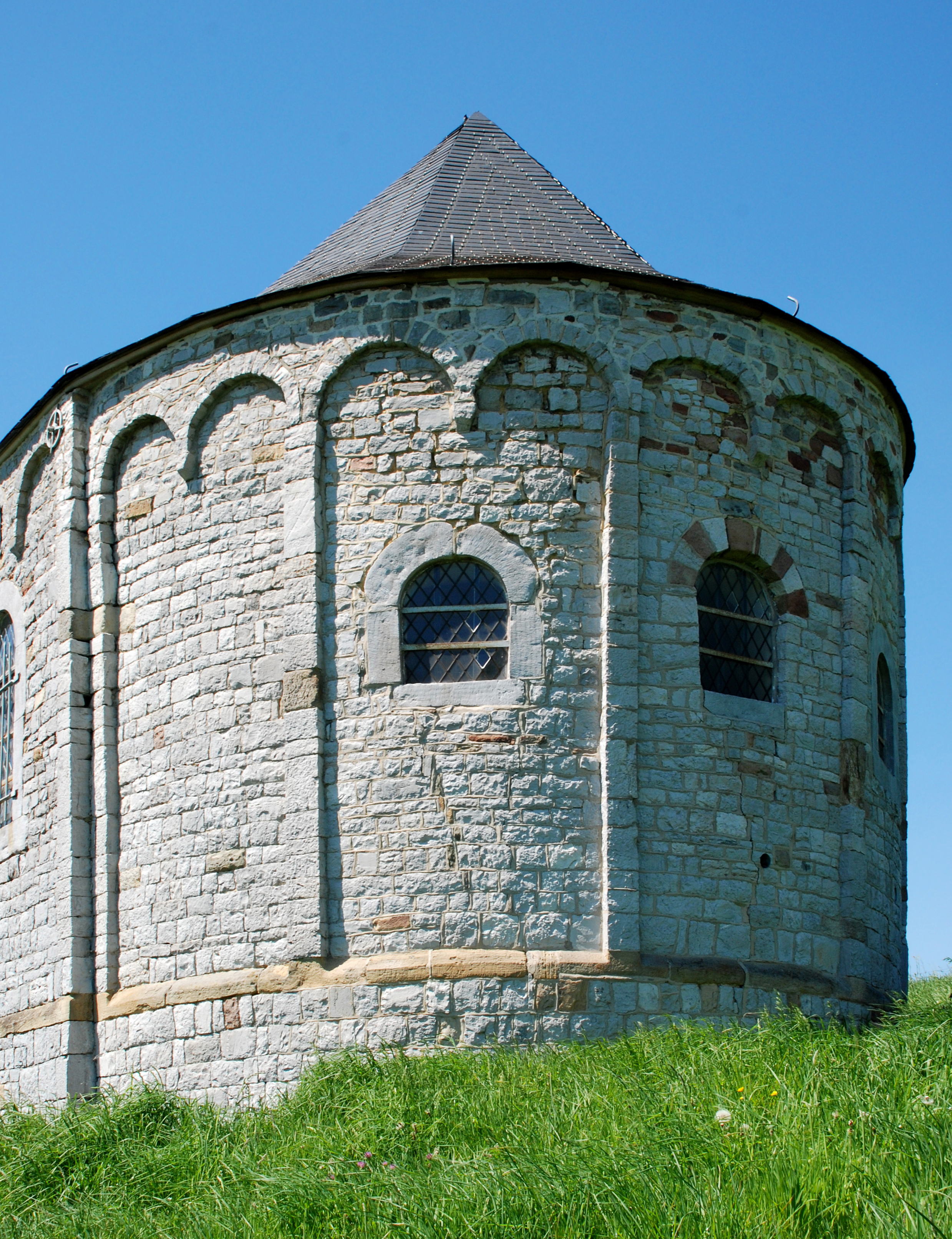 Belgique - Wallonie - Chapelle Saint-Pierre de Limet